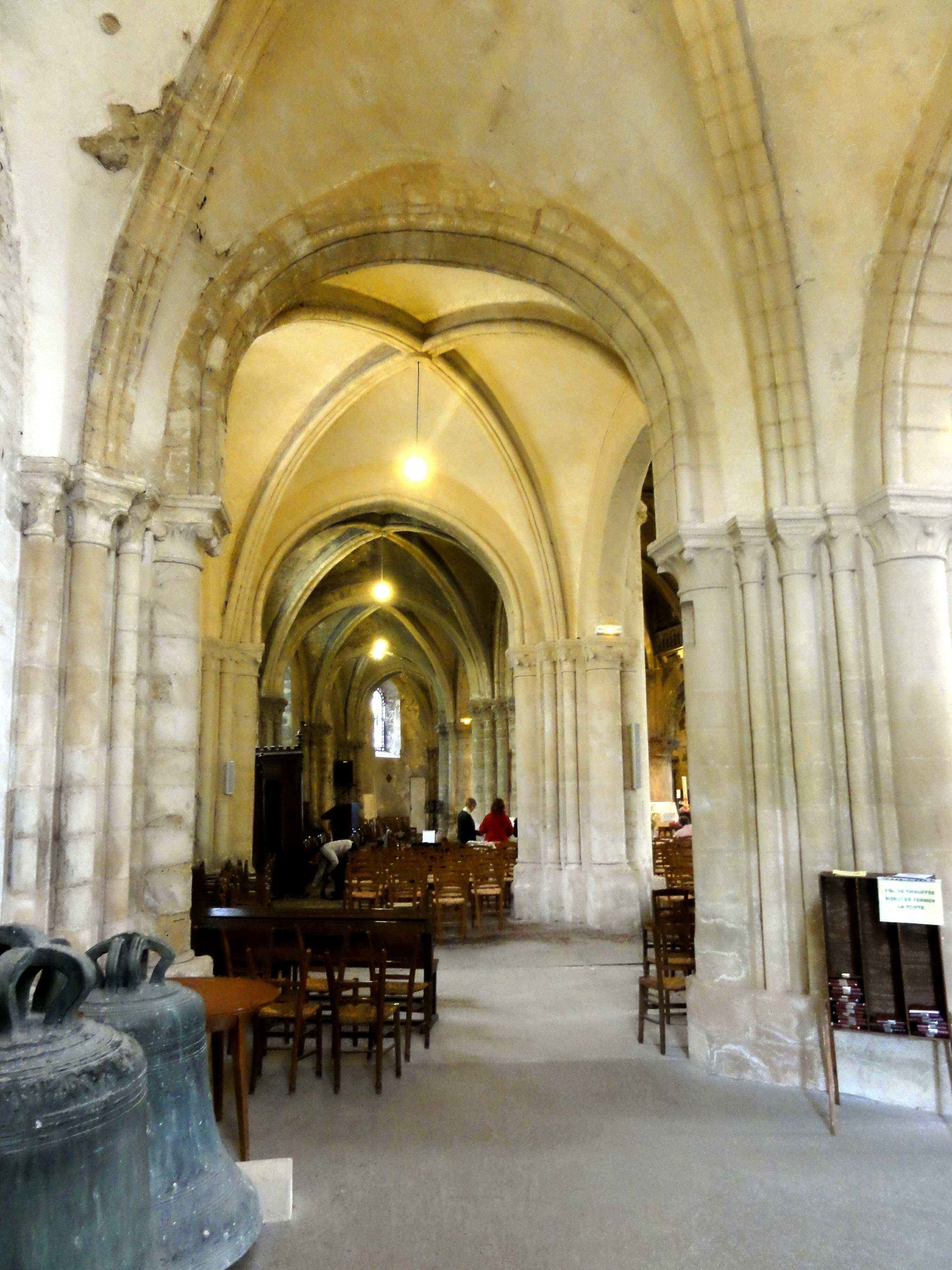 Intérieur de l'église - voir titre.